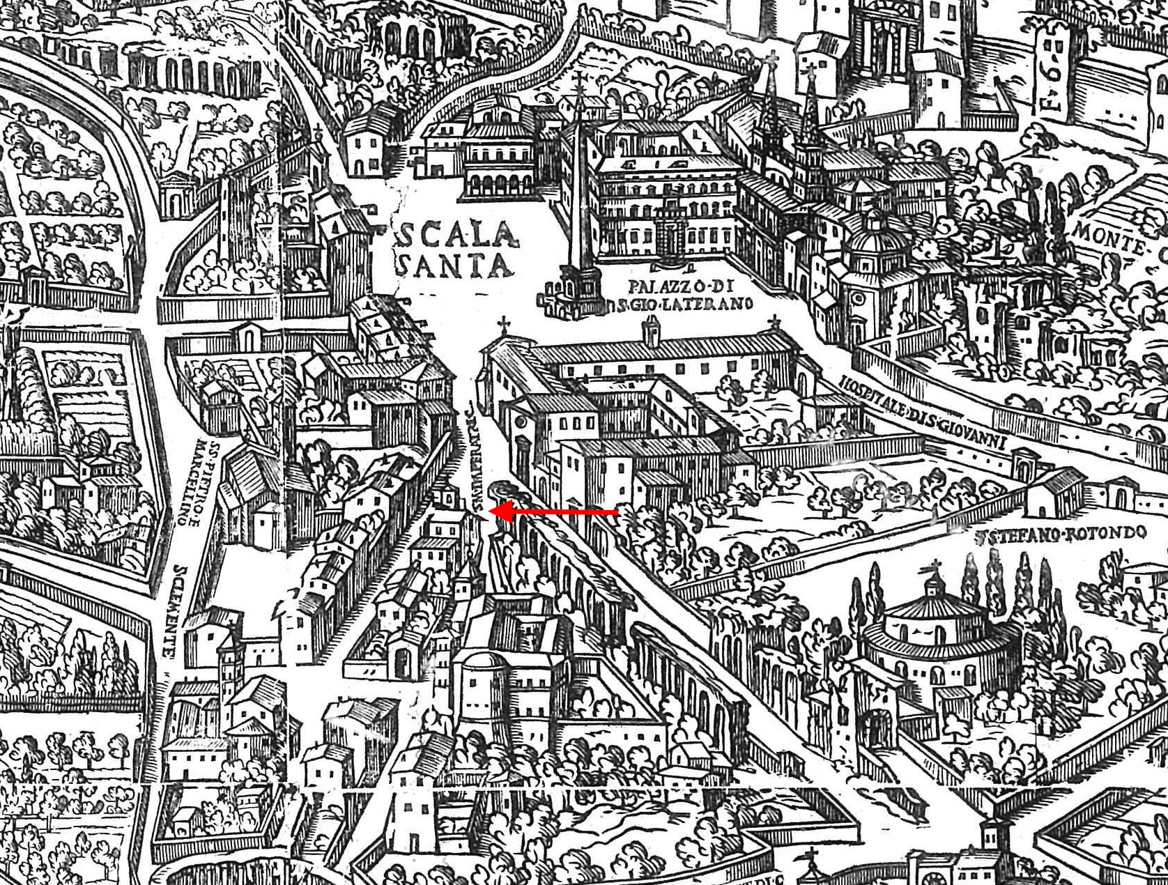 Pianta di Maggi